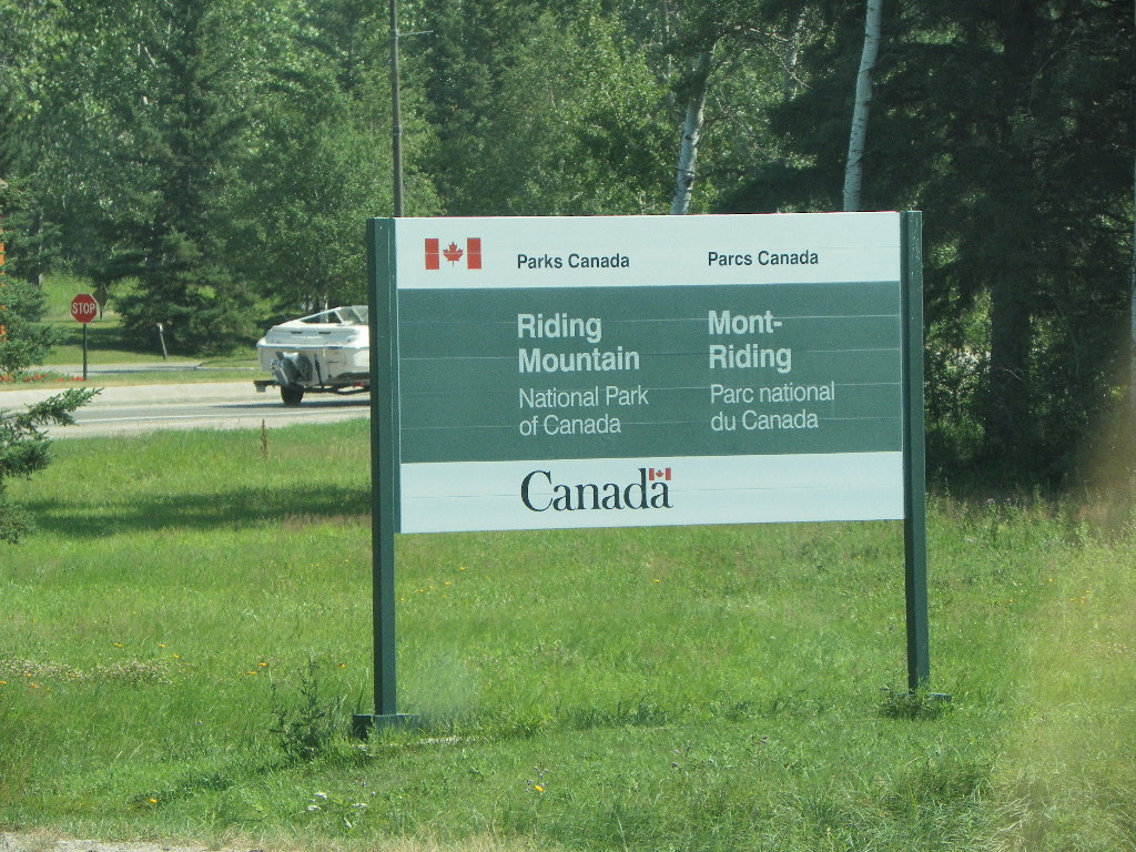 Panneau d'entrée Sud du parc national du Mont-Riding, visible depuis la Highway 10.